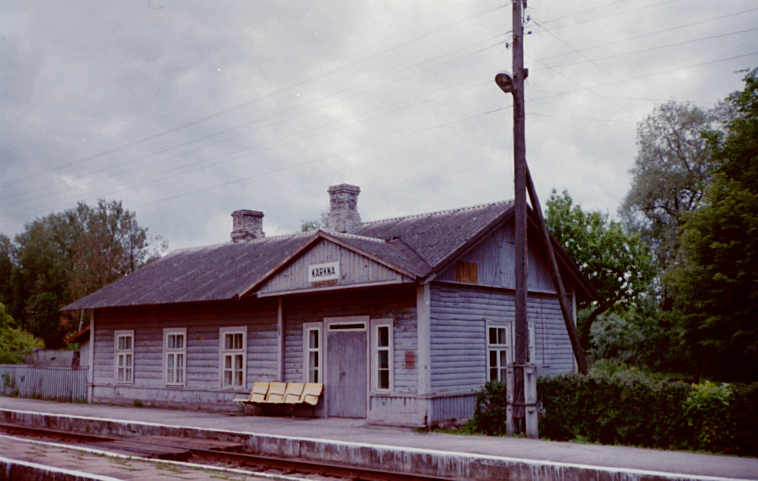 Kärkna jaamahoone